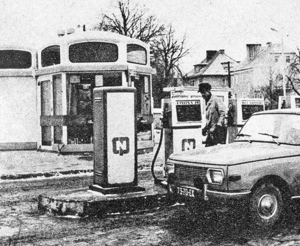 Stacja benzynowa w Człuchowie. Pierwsza w Polsce w całości wykonana z prefabrykatów z tworzyw sztucznych.